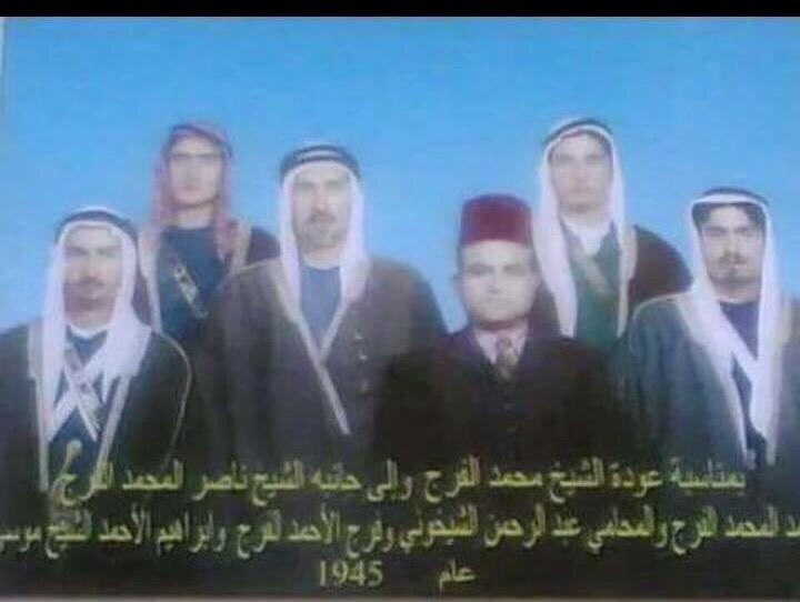 صورة لأحد الشيوخ في سورية الذين قاوموا الاحتلال الفرنسي وتم نفيه الى جزيرة قمران تعود هذه الصورة بعد وعدته من المنفى واستقبباله